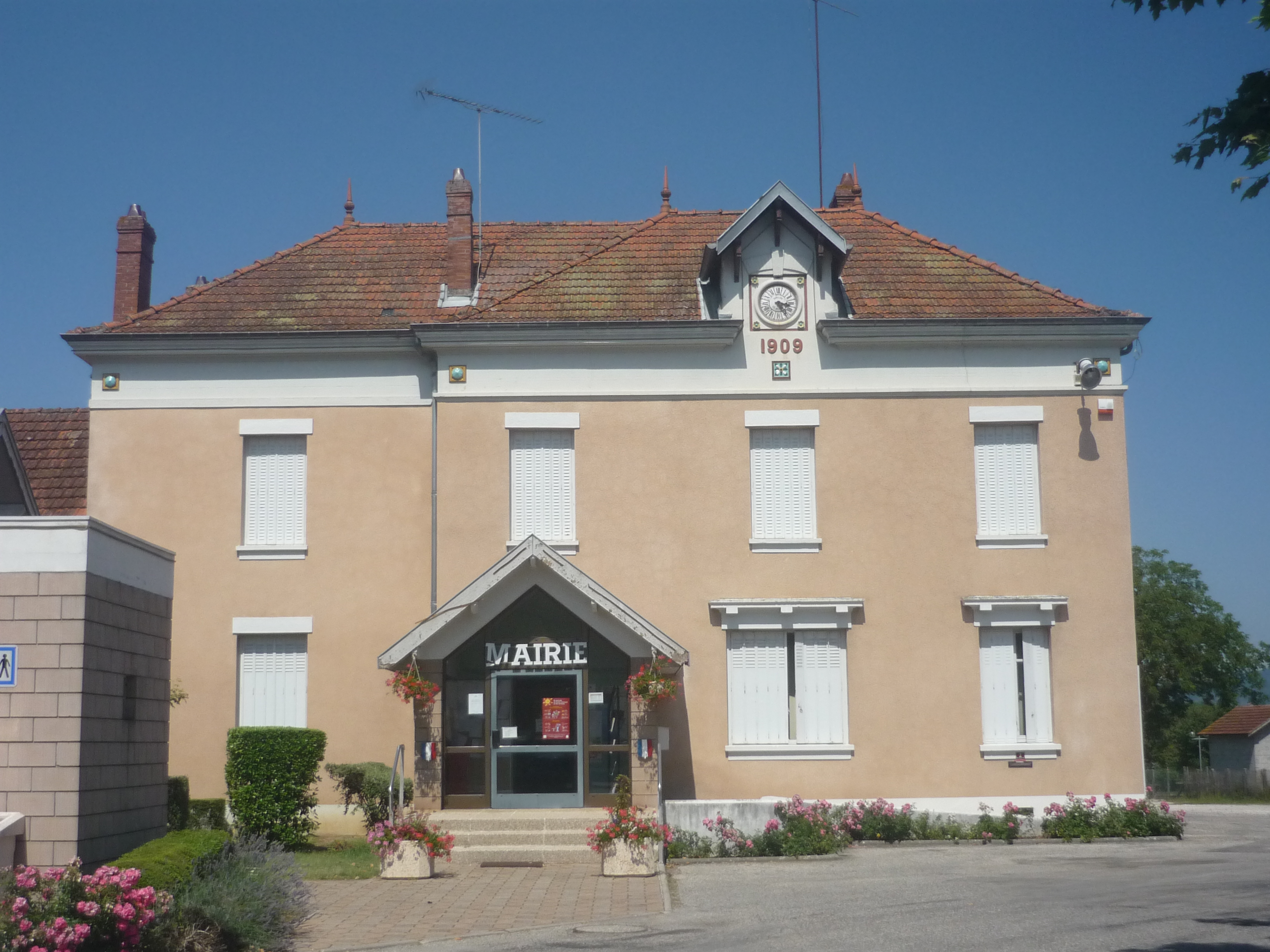 Mairie de la commune de Veyrins-Thuellin dans le département de l'Isère